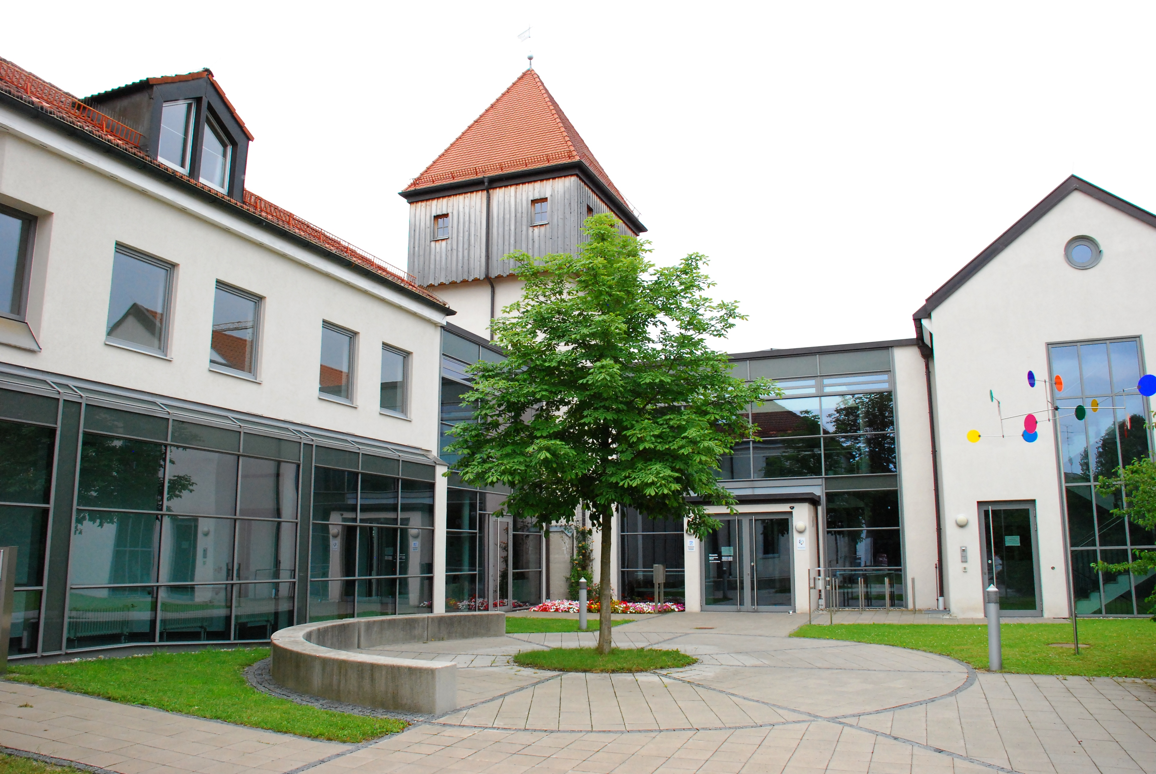 Rathaus der Gemeinde Putzbrunn, Landkreis München, Regierungsbezirk Oberbayern, Bayern.